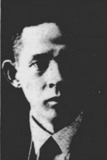 海野 数馬